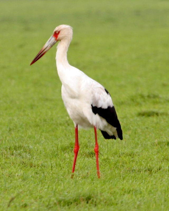 Maguari Stork Ciconia maguari, Entre Rios, Argentina